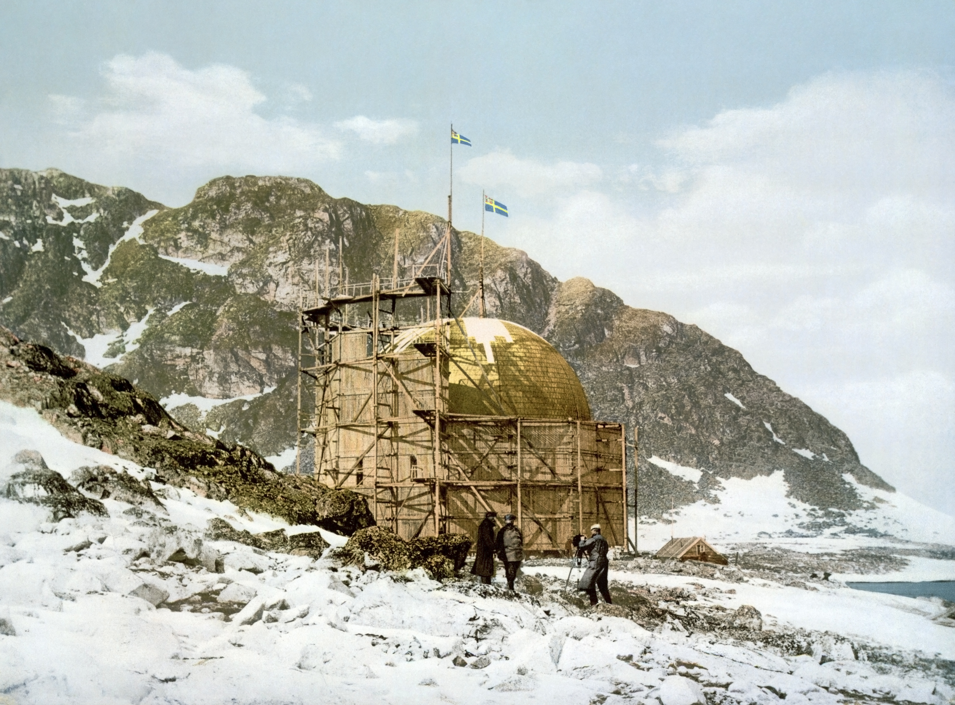 Andree's Station at Danskoen, Spitzbergen, Norway